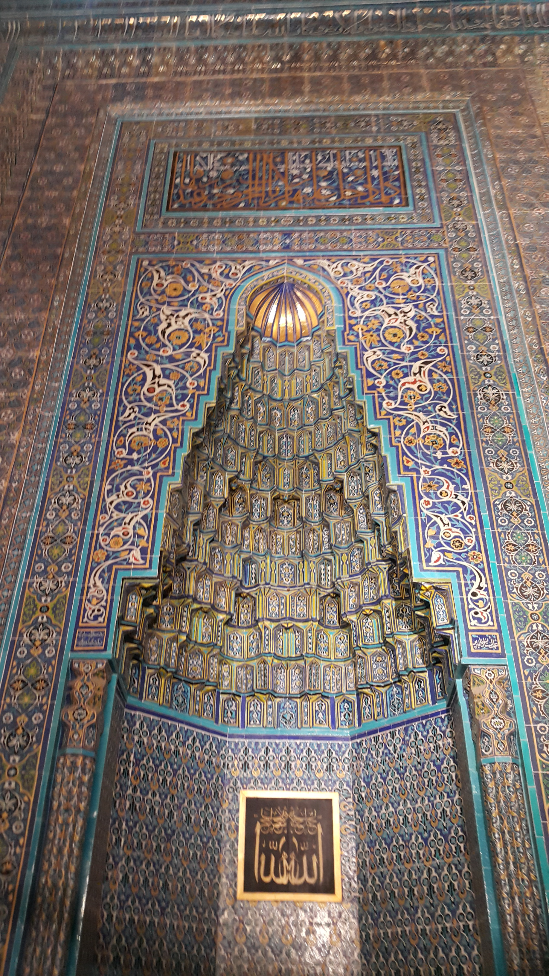 Yeşil Cami mihrabı